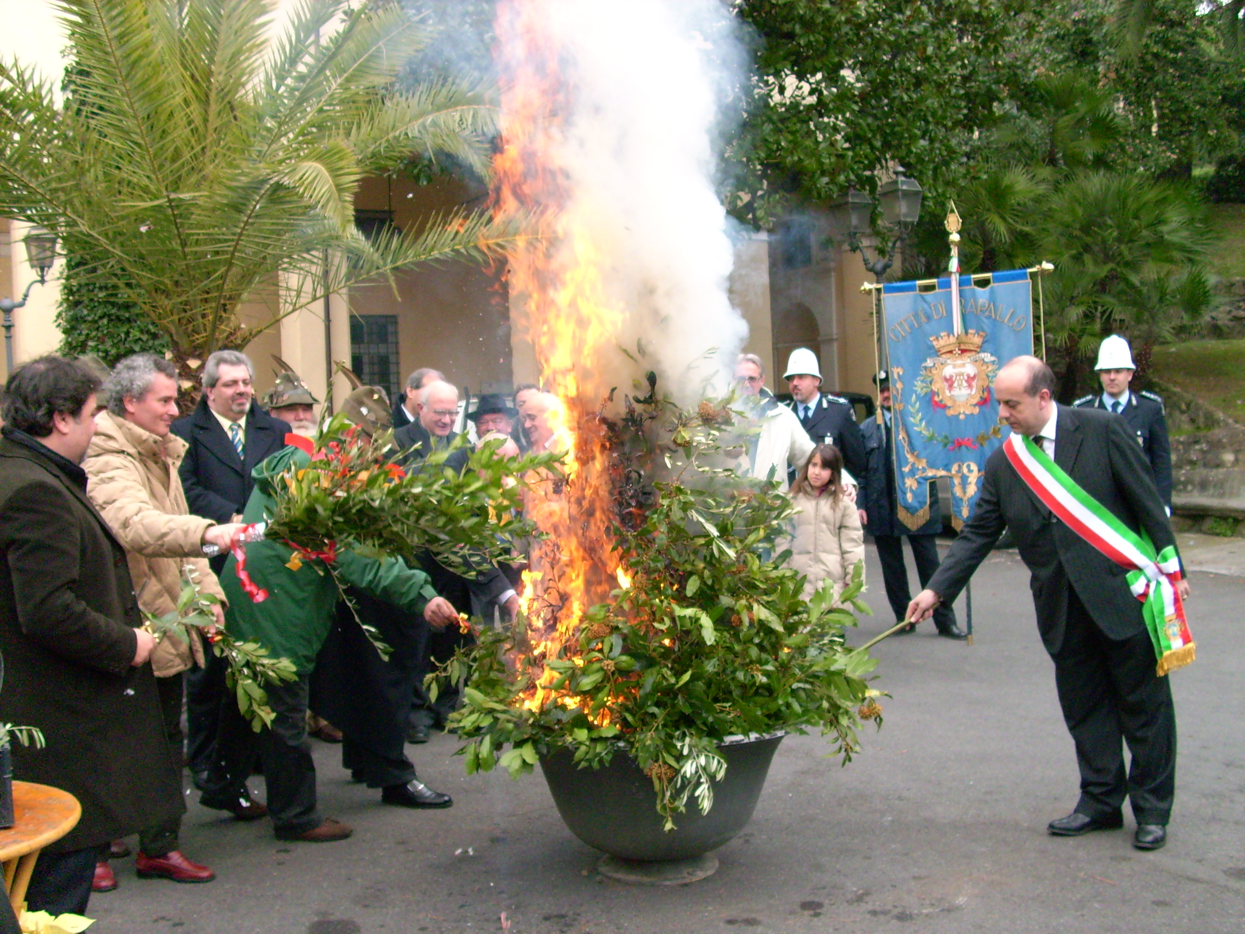 Celebrazione del "Confuoco" di Rapallo, Liguria, Italia